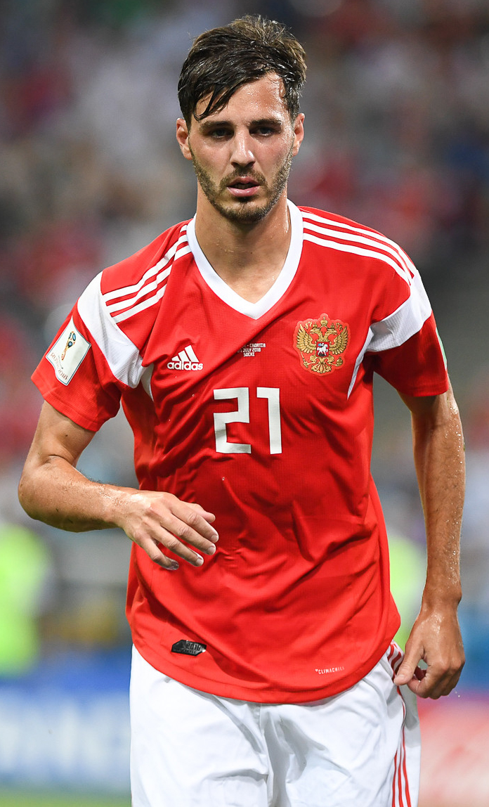 Сборная России заканчивает ЧМ-2018 с поднятой головой. Хорватия выходит в полуфинал